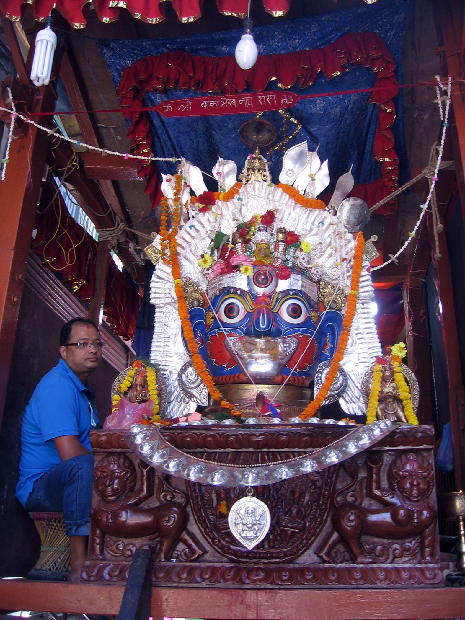 Mask of Baka Bhairav displayed at Wotu, Kathmandu during Yenya festival.